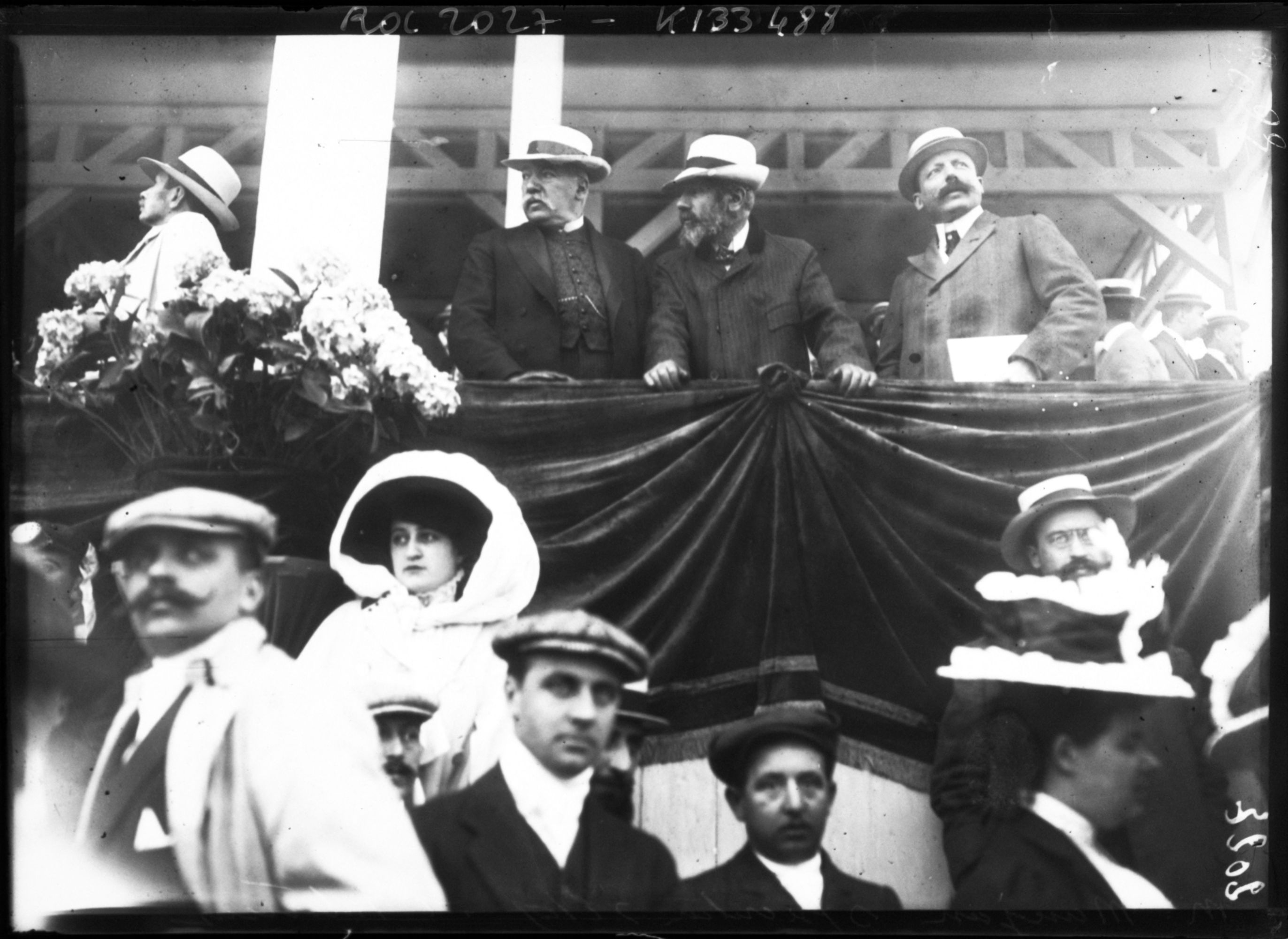 M. Maujan, sous secrétaire d'Etat à l'Intérieur [tribune décorée] [photographie de presse]